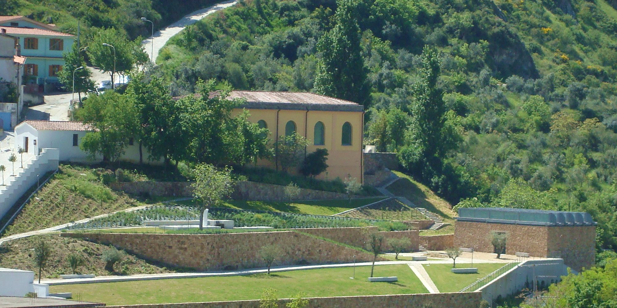 Museo Nivola ad Orani.